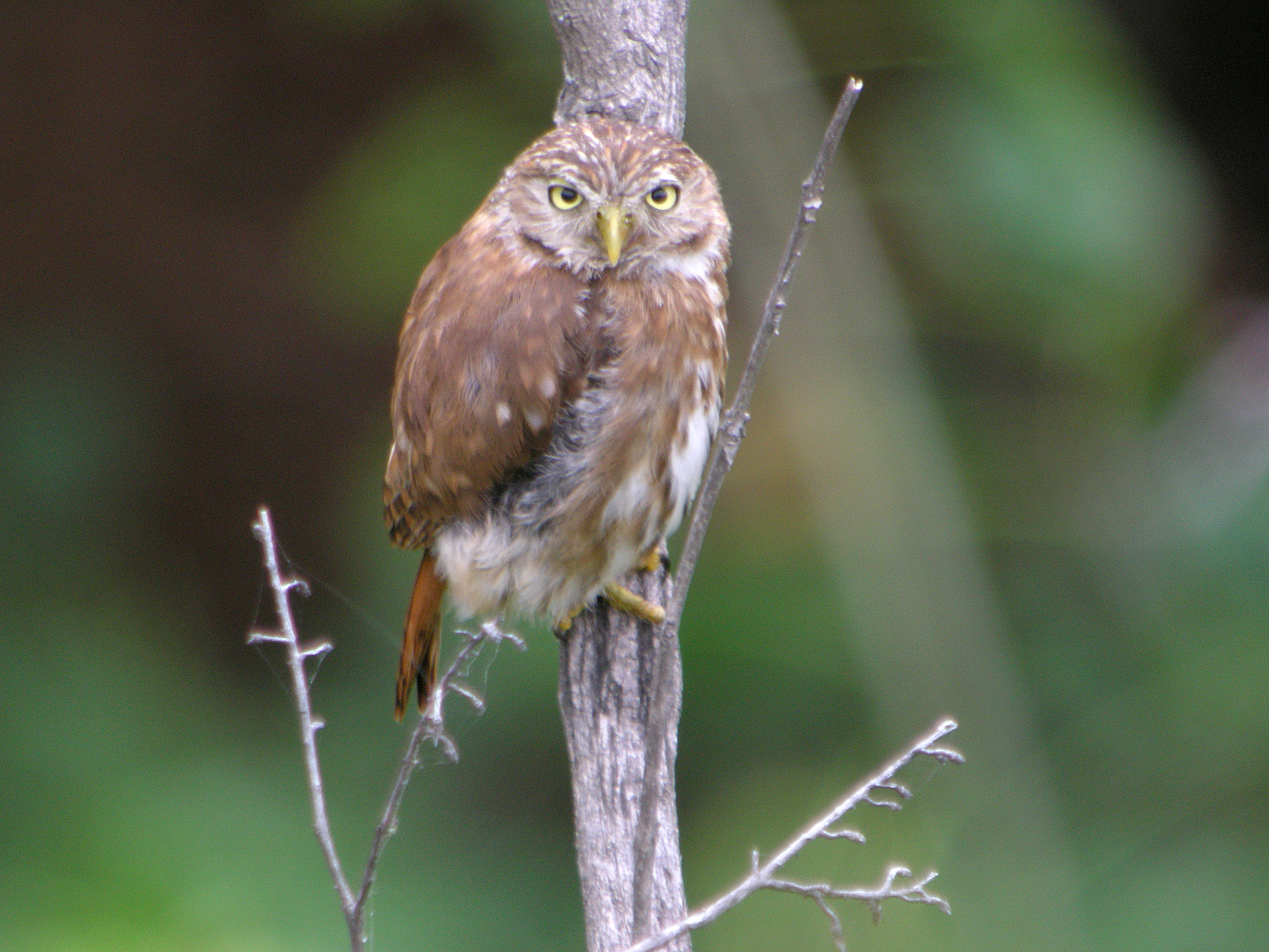 Peruvian Pygmy-Owl (Glaucidium peruanum) El Empalme, Ecuador